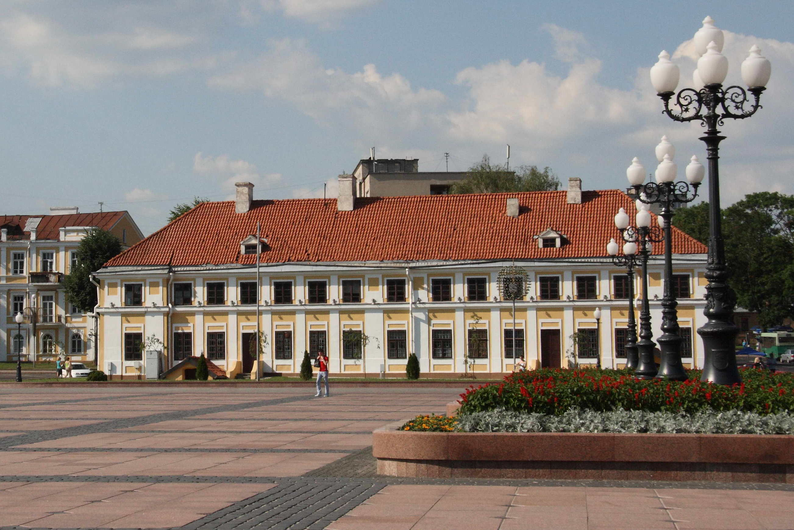 Гродно